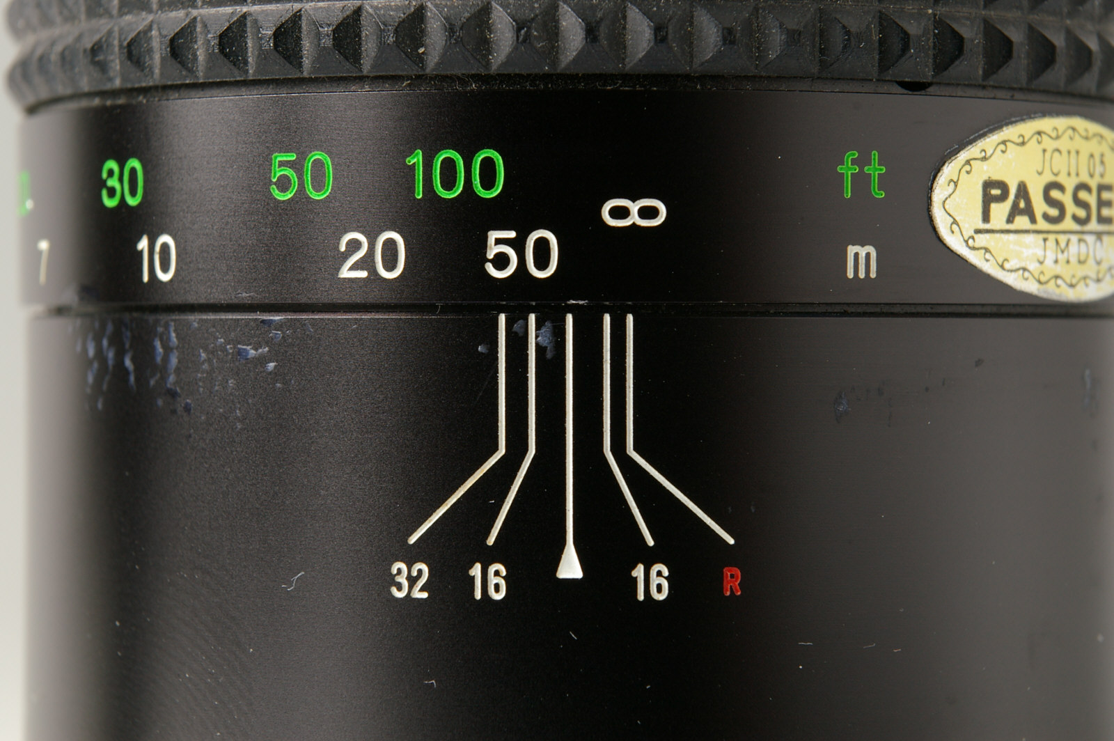 Schärfentiefenskala und Infrarotindex Minolta MD 4.5/300mm IF